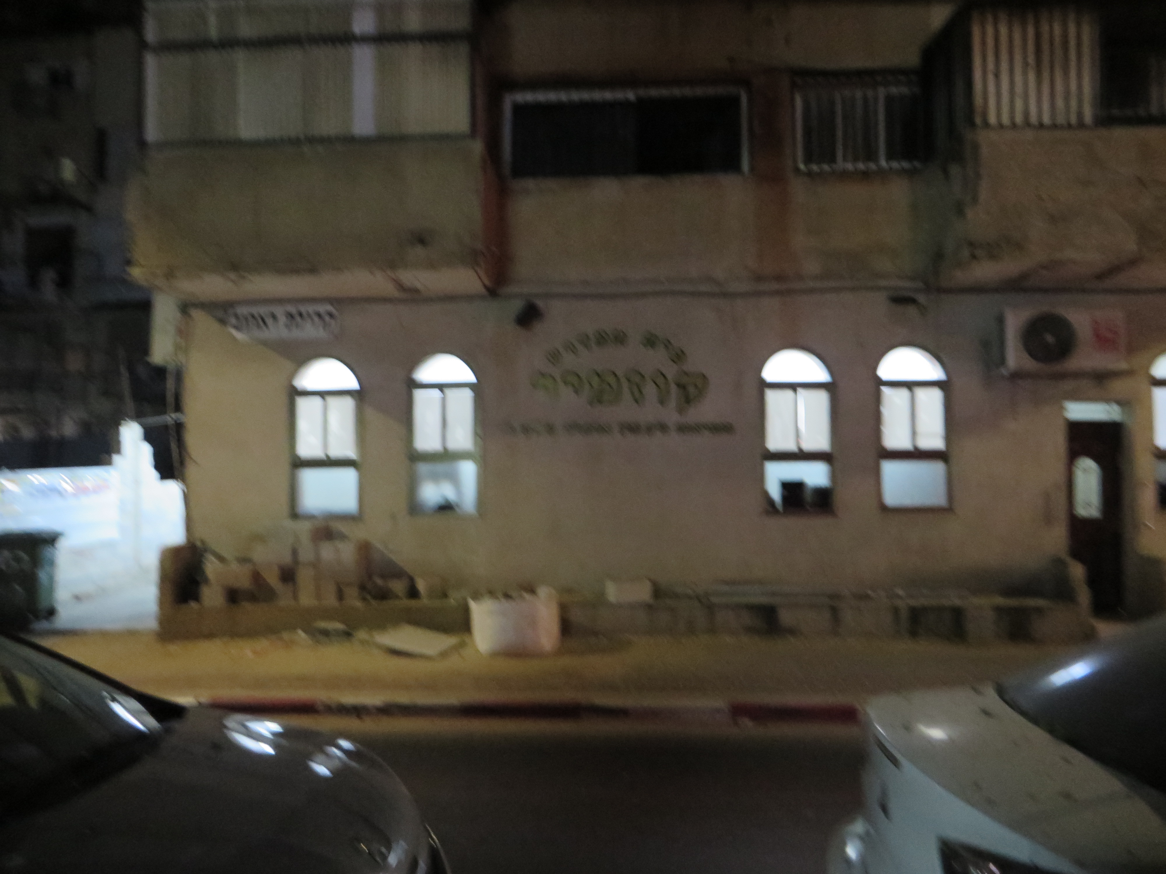 בית המדרש קוז'מיר ברחוב רש"י בבני ברק